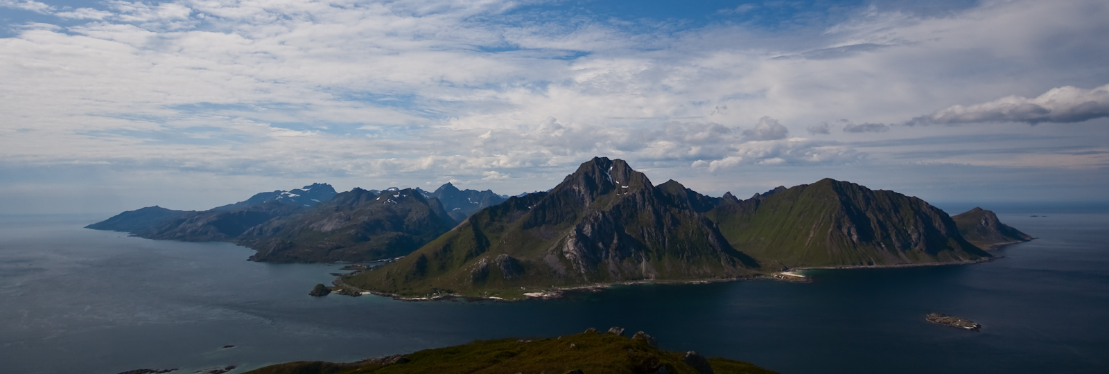 Flakstad island seen from Offersøykammen